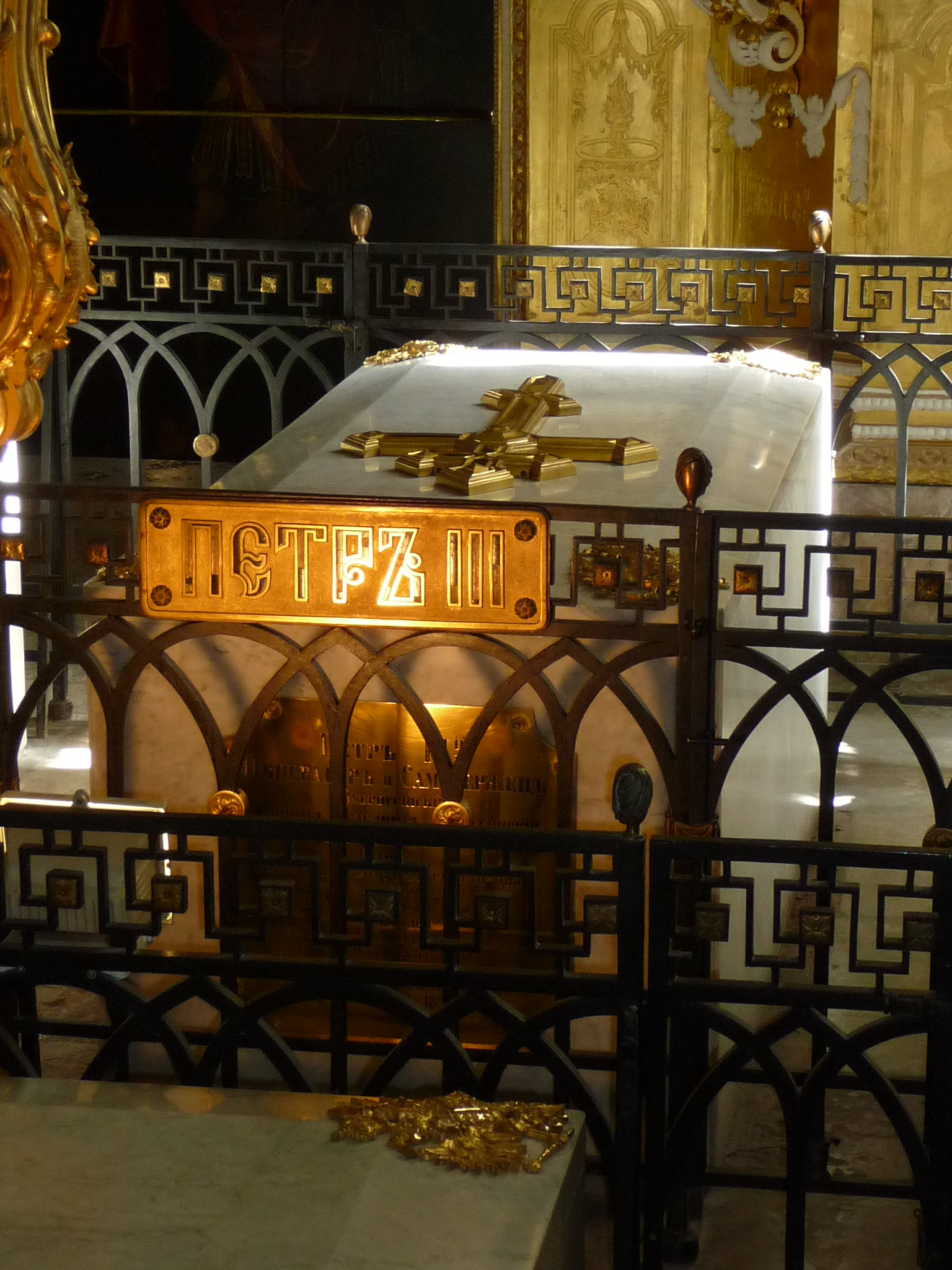 RussianTzarsTumbs-p1030586.jpg